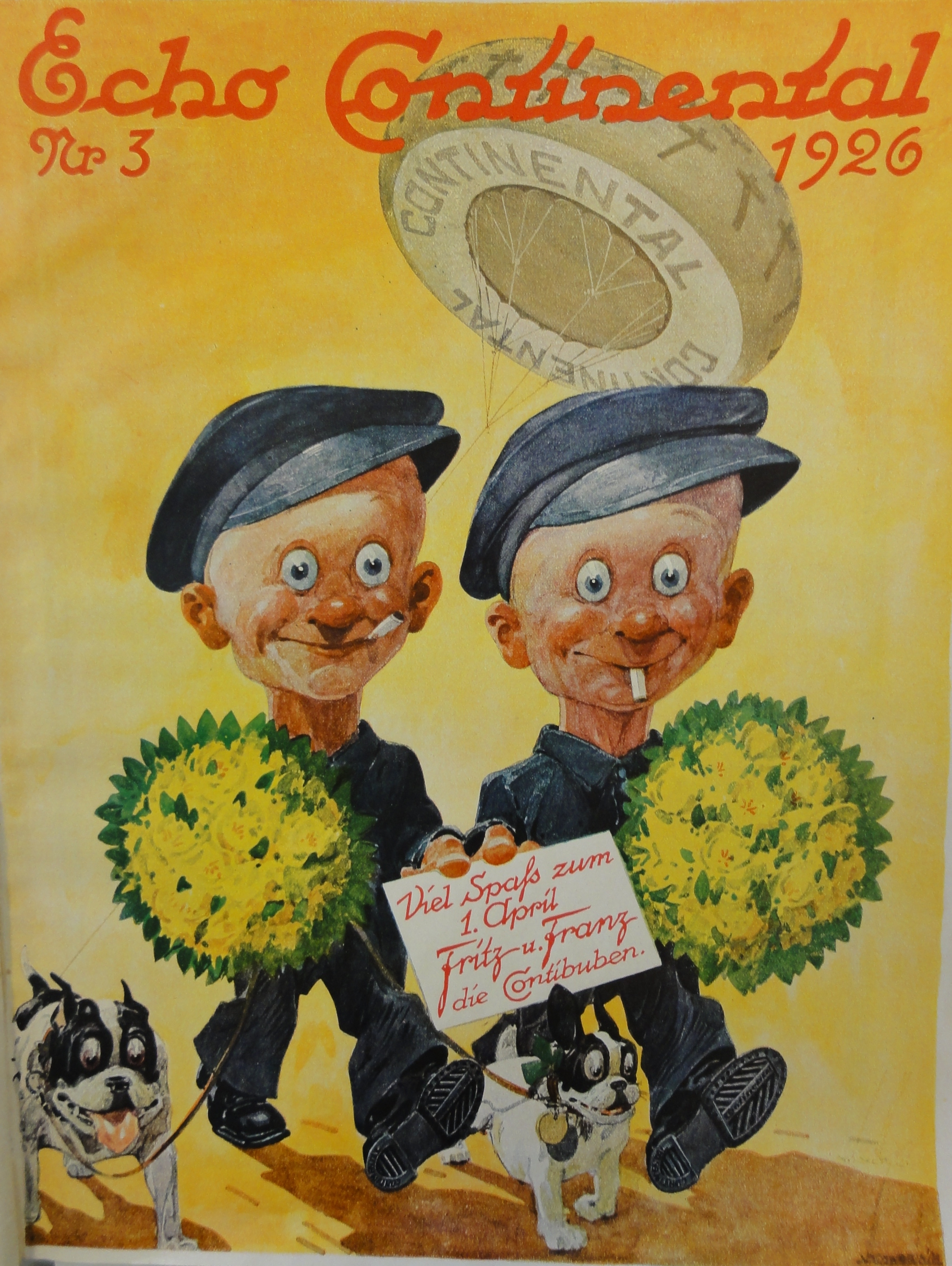 Titelblatt "Echo Continental", 1926, Nr. 7, Firmenzeitung der Continental Gummiwerke Hannover AG